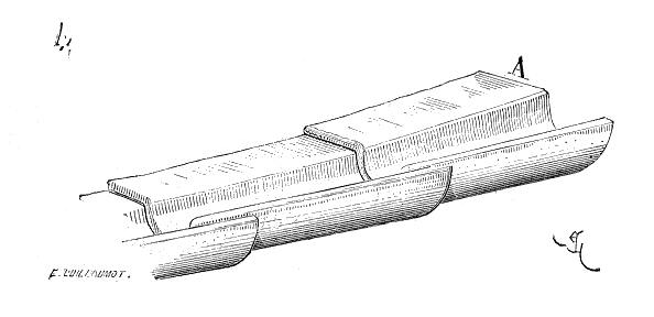 ... Il n'est pas besoin de dire que ces tuiles gouttières n'étaient employées que dans les constructions les plus ordinaires élevées en brique ou en moellon. C'élait un moyen de recueillir les eaux de pluie et de les approvisionner dans des citernes. Les tuiles gouttières que l'on trouve encore dans le midi et l'ouest de la France sont très-grandes; elles mesurent en longueur 0m,65 (2 pieds), et ont d'un côté un rebord A prolongé qui servait à les sceller à la tête du mur sous l'égout du toit (voy. fig. 4). Bien entendu, ces tuiles étaient posées suivant un plan incliné, et se trouvaient ainsi plus éloignées de l'égout du comble, à l'extrémité inférieure du chenal qu'à son point le plus élevé. Ce moyen ne pouvait donc convenir qu'à des façades de peu d'étendue ...